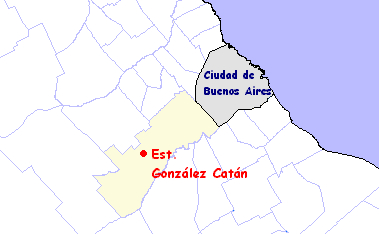 Estación González Catán